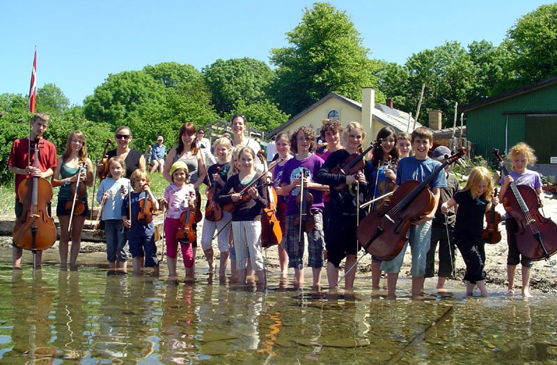 Die Coolen Streicher beim Probenwochenende 2010 auf der Ocheseninsel